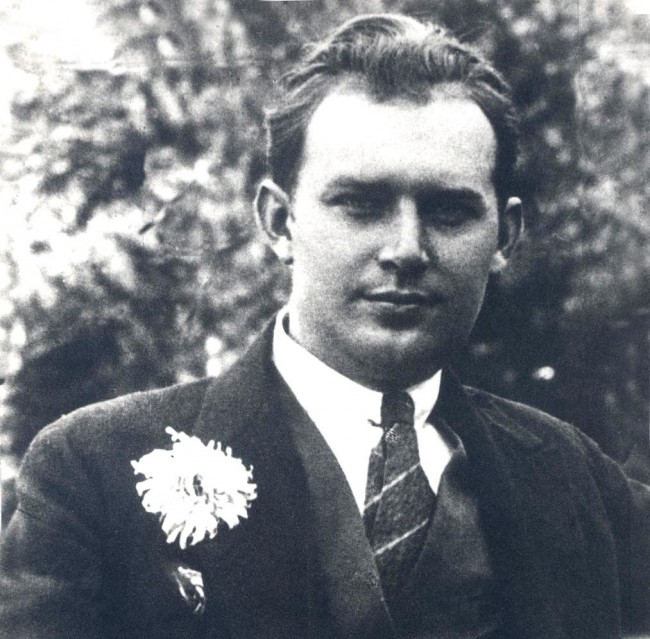 Jiří Wolker